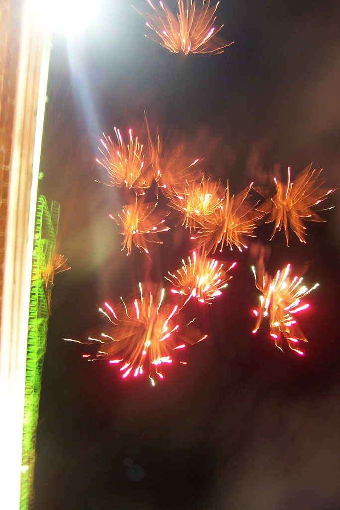 Fuegos artificiales en el marco de las Fiestas Patrias (15 de septiembre) en Atlizco (Puebla, México)